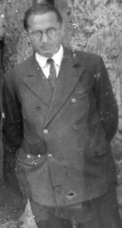 Orixe idazlea 1933an. Nicolás Ormaechea